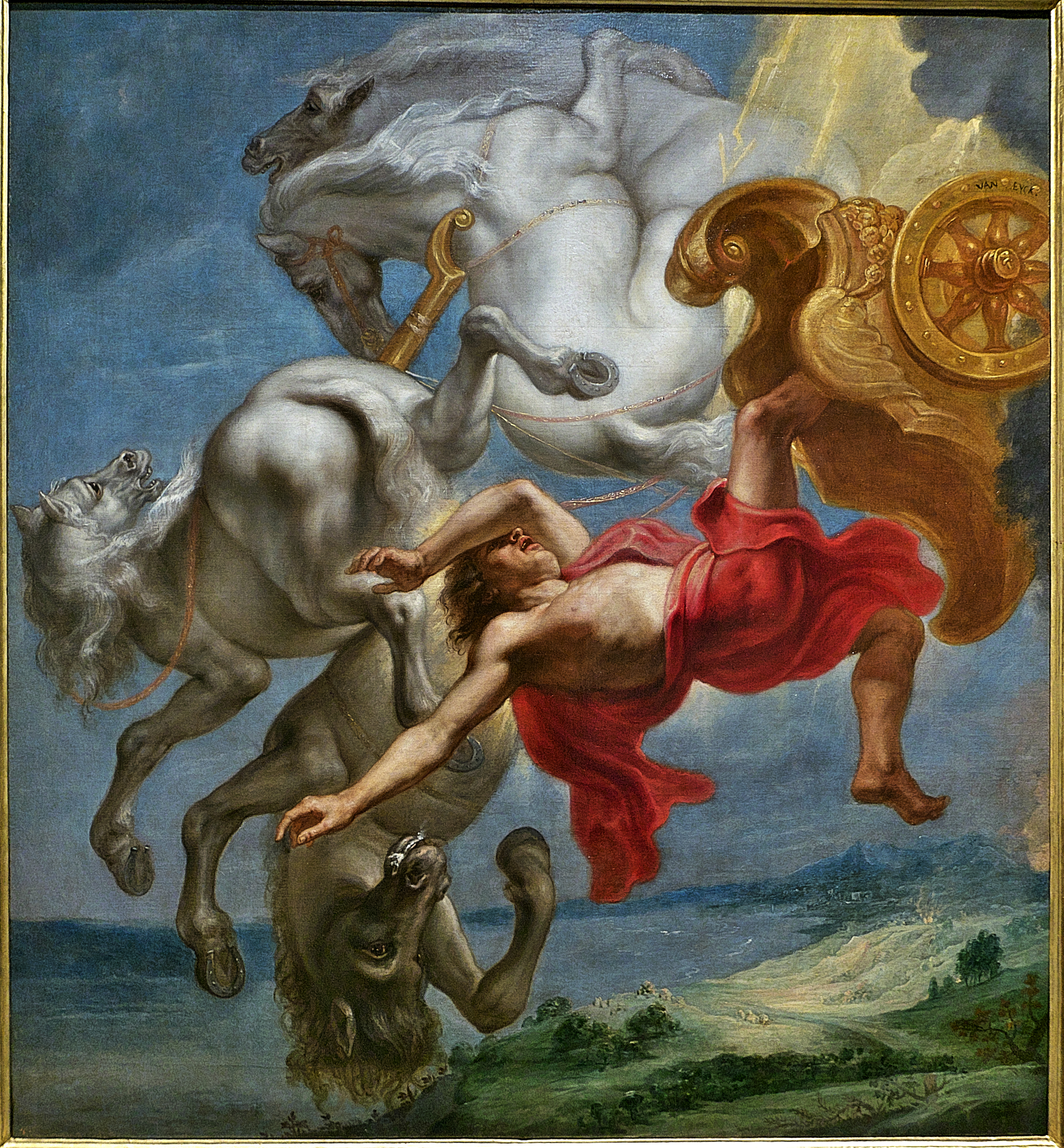 Faetón, hijo de Febo y de Clímene, se atreve conducir el carro del sol de su padre, ocasionado el caos en la tierra y la intervención de Júpiter con sus rayos. Rubens trazó unos bocetos, inspirados en Las metamorfosis, para la decoración de la Torre de la Parada. Jan Carel van Eyck pinta al óleo sobre lienzo (1636-1638) la referida caída del hijo de Apolo. Caída de Faetón, Peter Paul Rubens